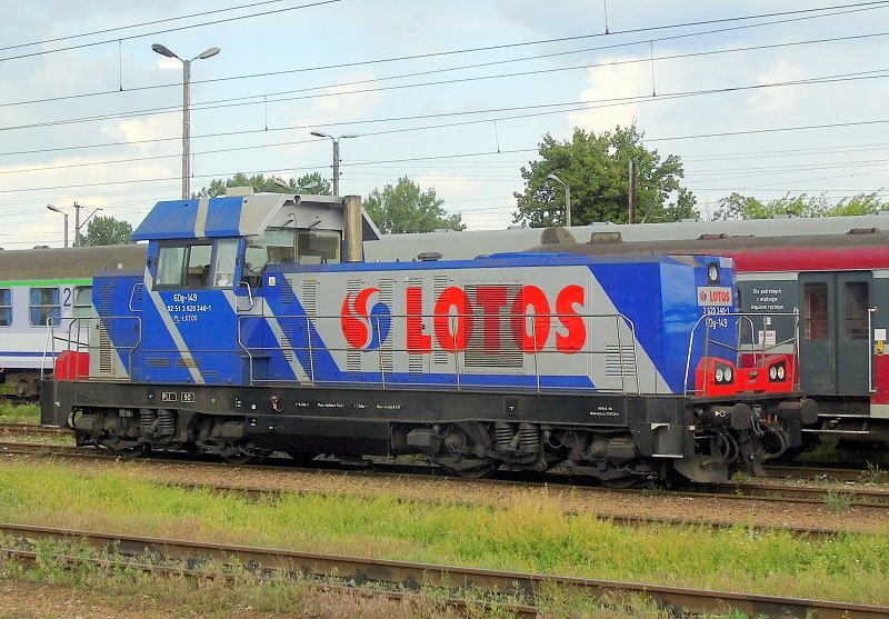 Spalinowóz 6Dg-149 należący do przewoźnika Lotos Kolej manewruje na terenie stacji Kraków Płaszów.